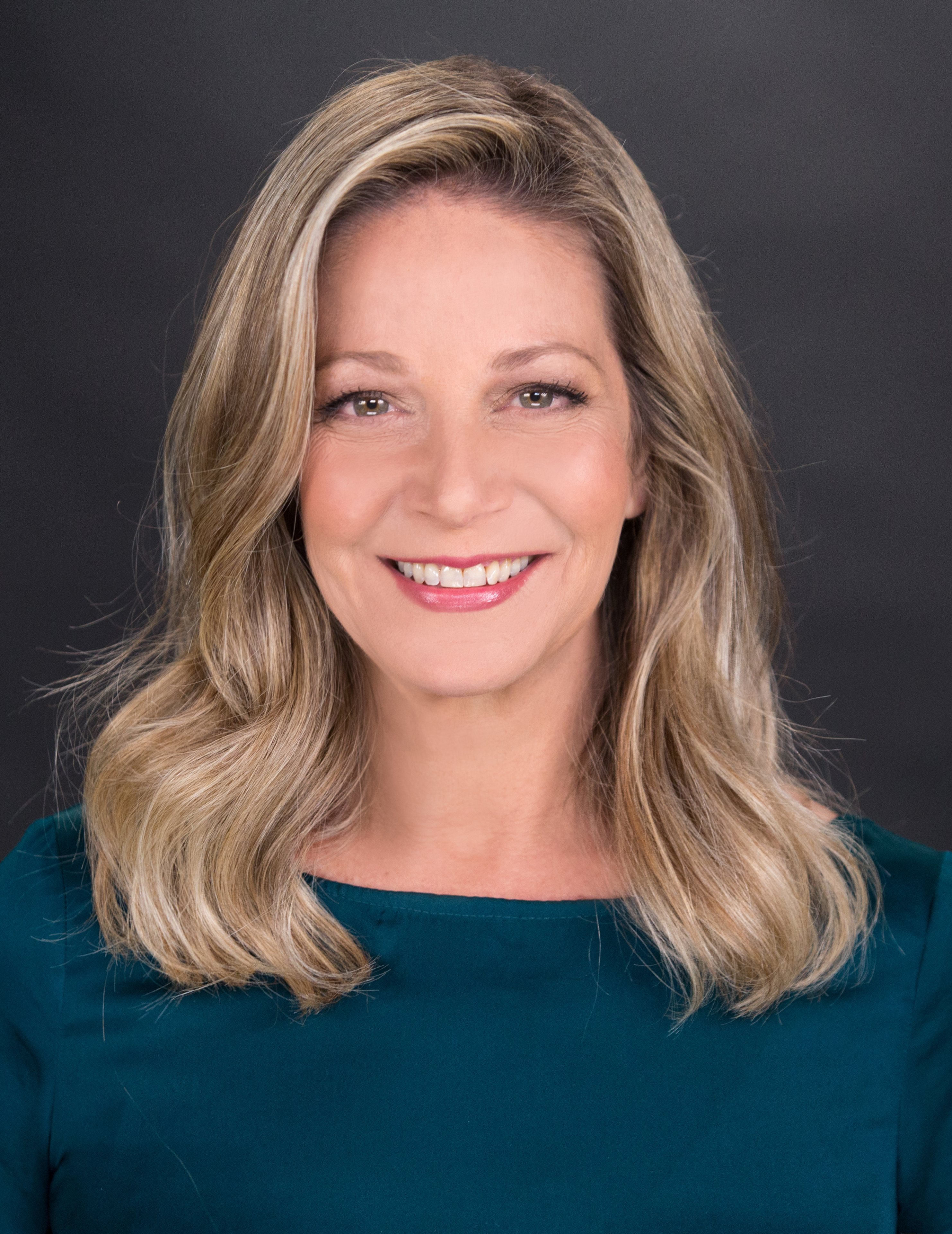 מיקי חיימוביץ